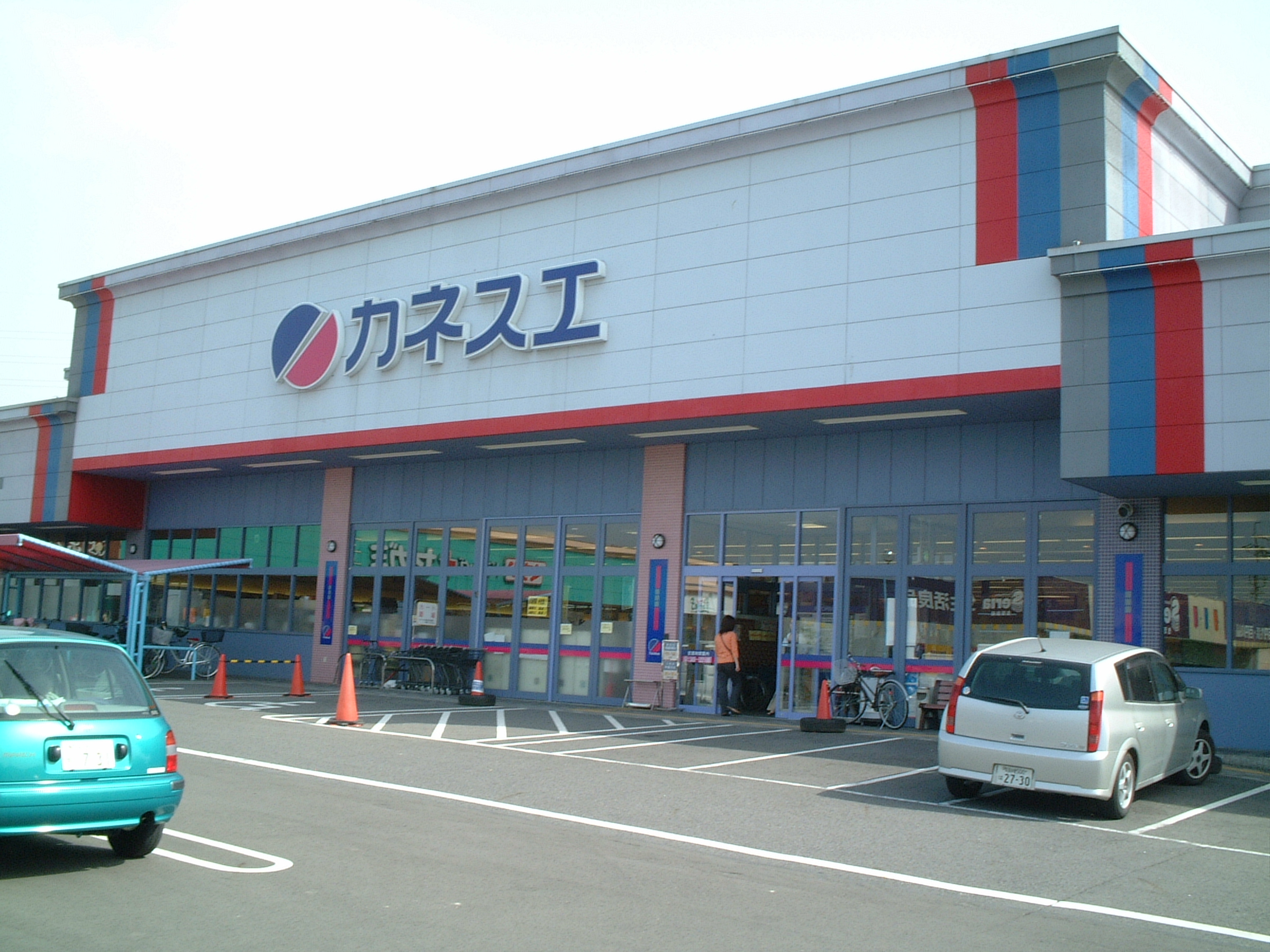 カネスエ瀬部店の画像